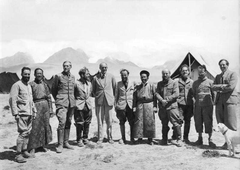 Tibetexpedition, Expedition zu Gast bei Gould Gangtok, die Expeditionsmitglieder zu Gast bei Mr. Gould (zwischen Kala und Dochen) [Von links nach rechts: k. A., k. A., Beger, Schäfer, Sir Basil Gould, Krause, k. A., Wienert, Geer, k. A., k. A.] Abgebildete Personen: Beger, Bruno Dr.: SS-Hauptsturmführer, Abteilungsleiter Sven-Hedin-Institut, Deutschland (GND 128720654) Schäfer, Ernst Dr.: SS-Sturmbannführer, Leiter des Sven-Hedin-Institutes, Deutschland (GND 123991420) Krause, Ernst: Mitarbeiter im Sven-Hedin-Institut, Deutschland